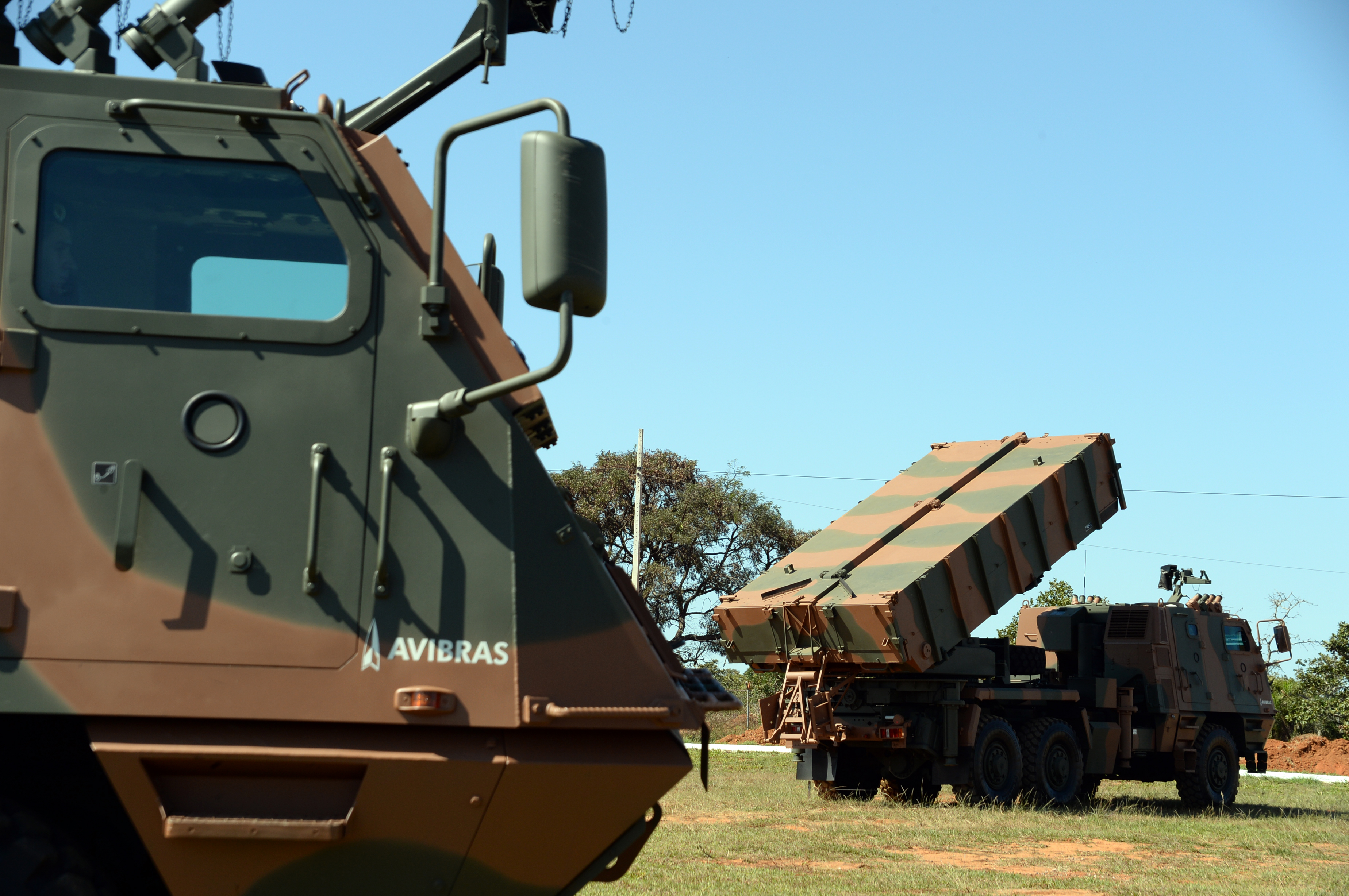 06/06/2014, Formosa - GO Fotos: Jorge Cardoso